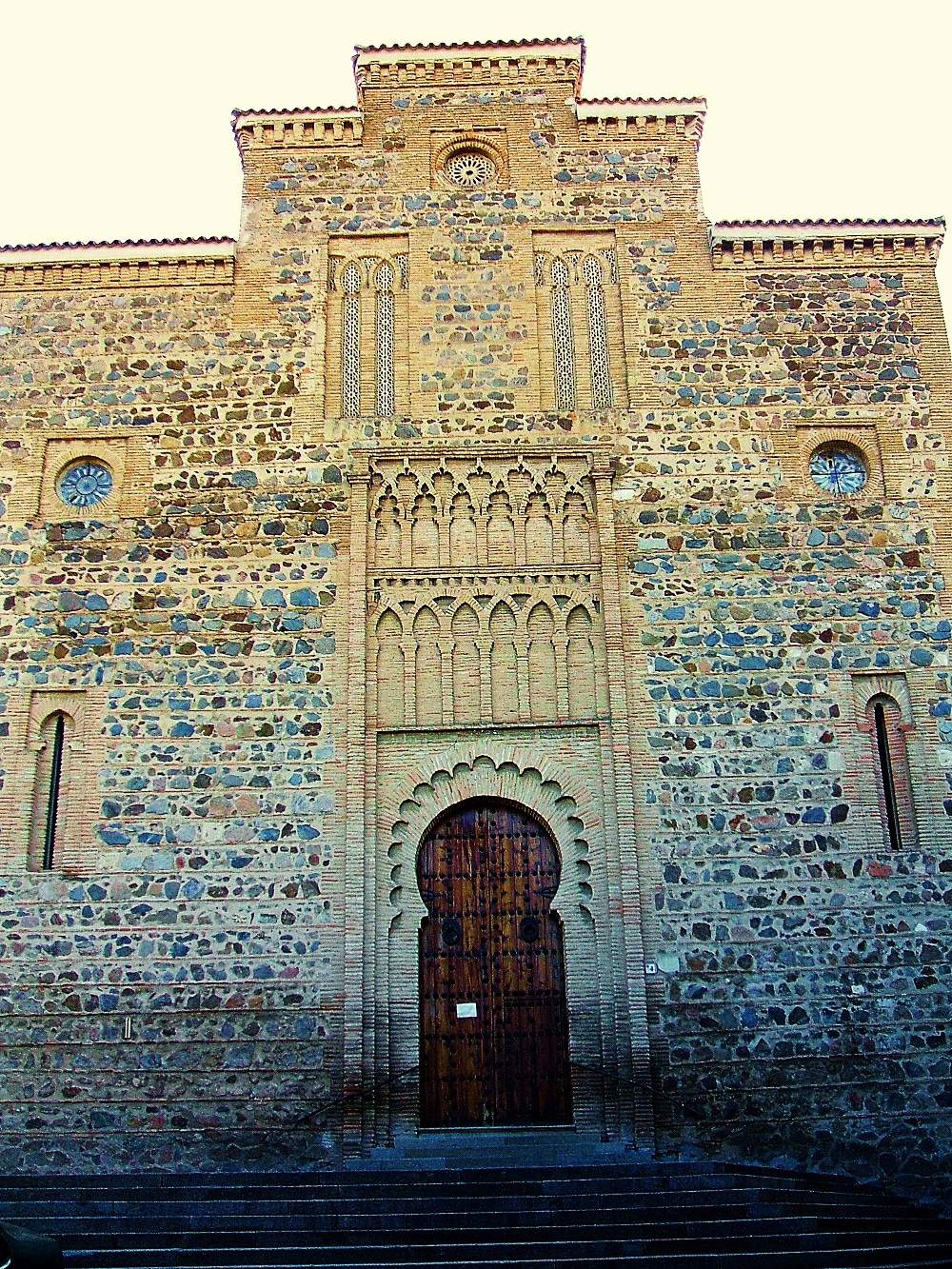 Church of Santiago del Arrabal, Toledo